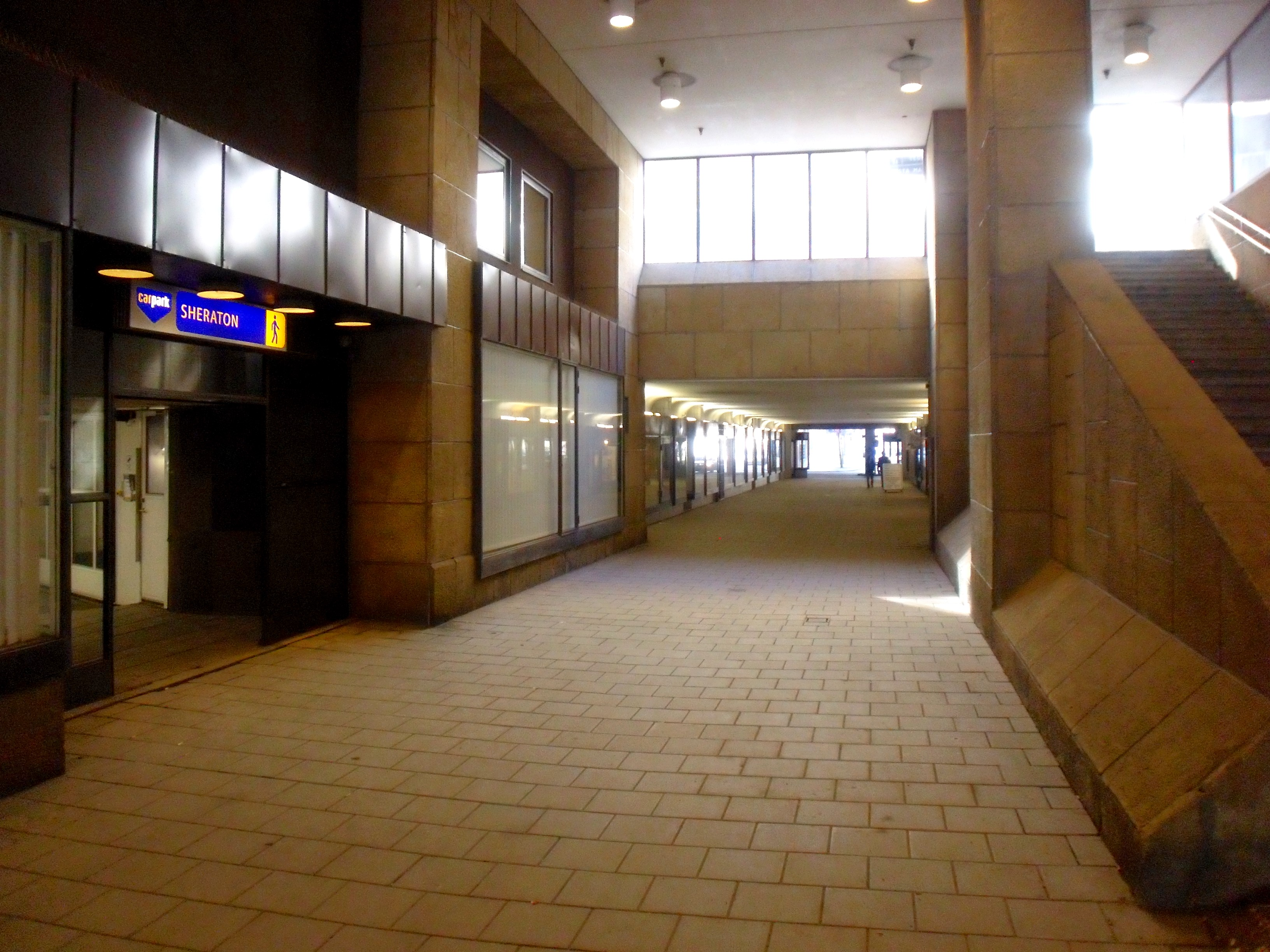 Tysta Mariegången Stockholm, mars 2010